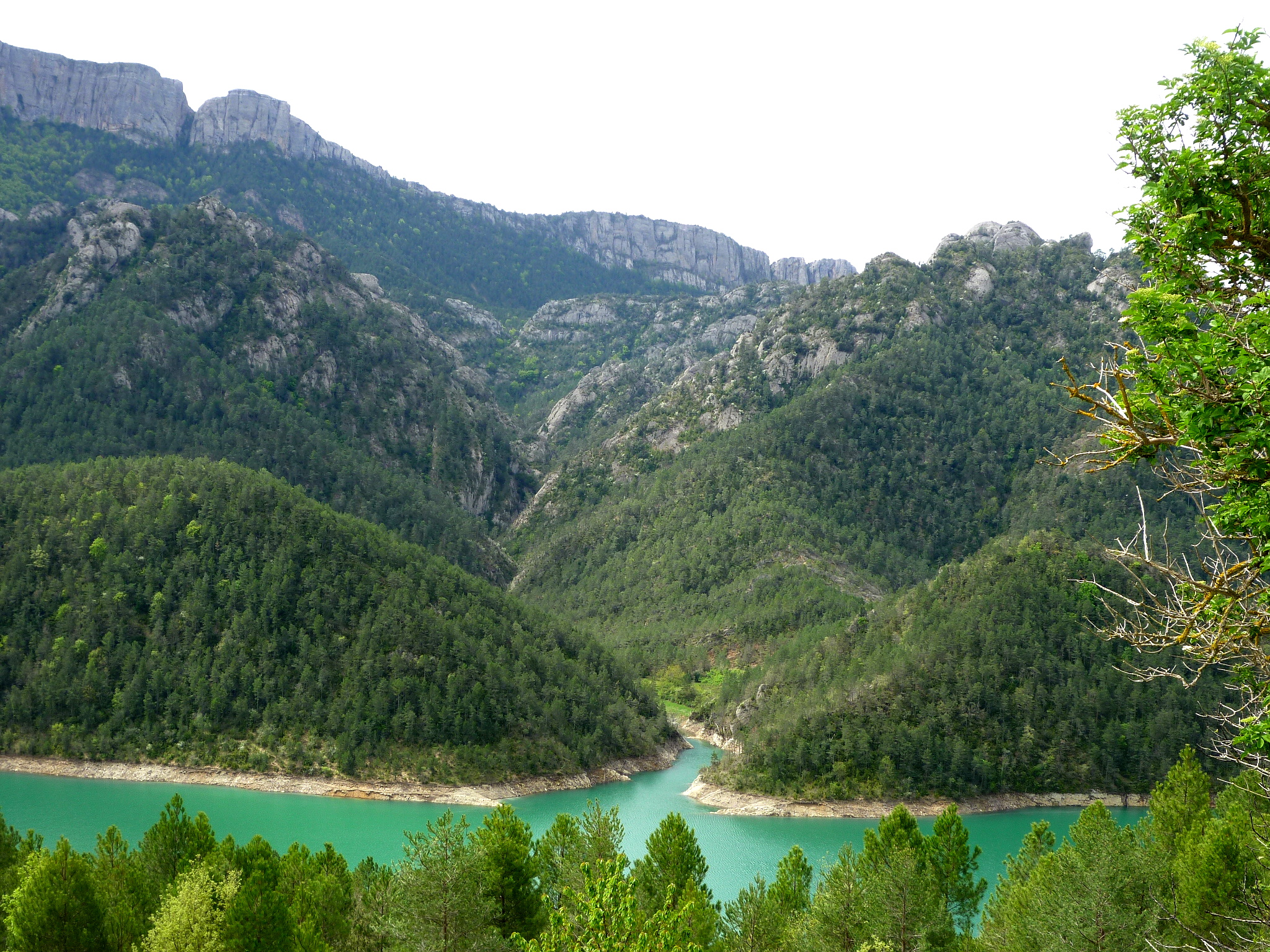 Església de Sant Climent de Castelltort (Guixers): dalt del turó de la dreta del canal del Forat, al peu de la serra dels Bastets